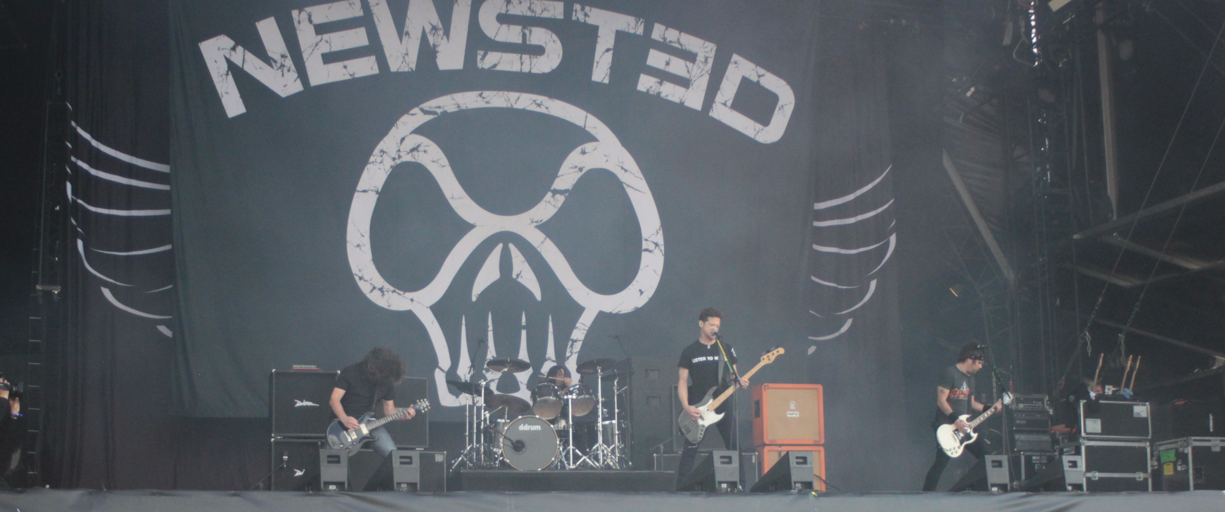 Newsted, Hellfest 2013, Fr-44-Clisson.